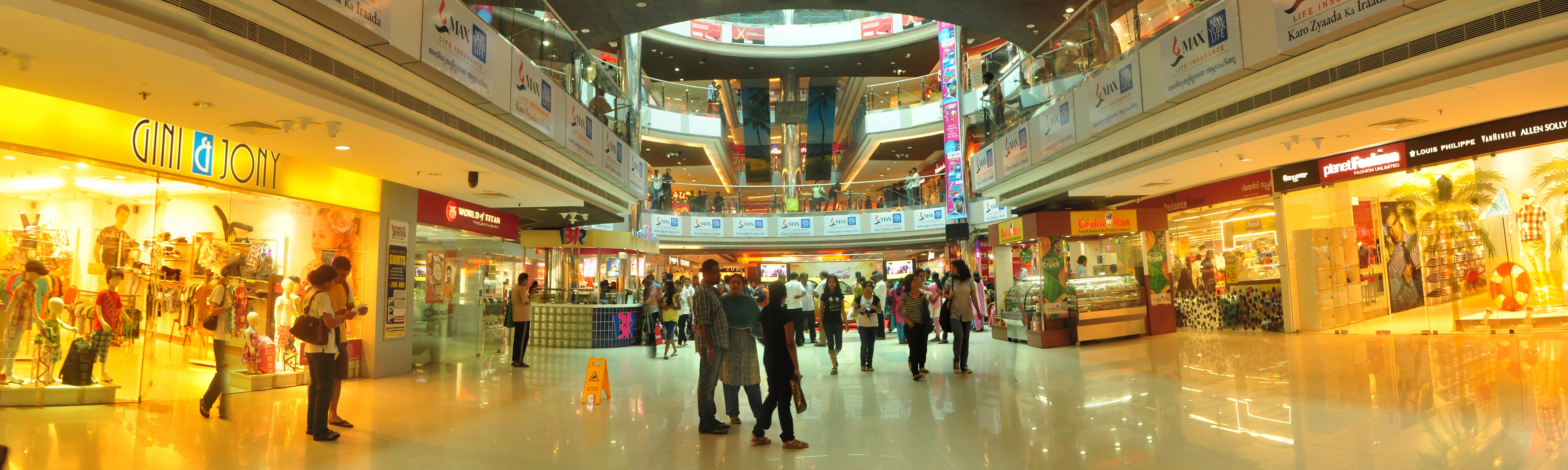 കൊച്ചിയിലെ ഓബറോണ്‍ മാള്‍- ഉള്‍വശം വിശാല ദൃശ്യം (Oberon Mall of Kochi, Panaromic view made by stitching 4 different shots together